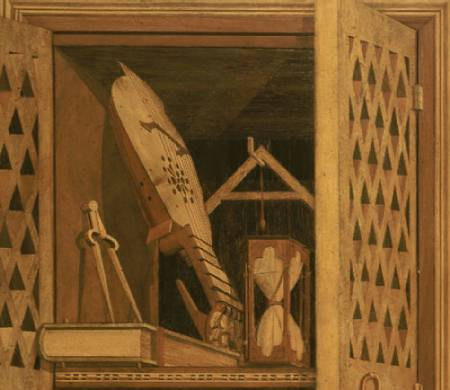 Stdiolo di guidobaldo da montefeltro